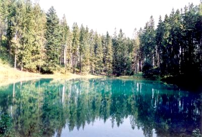 Foto: Jurdik Juraj, Jezersko 2005